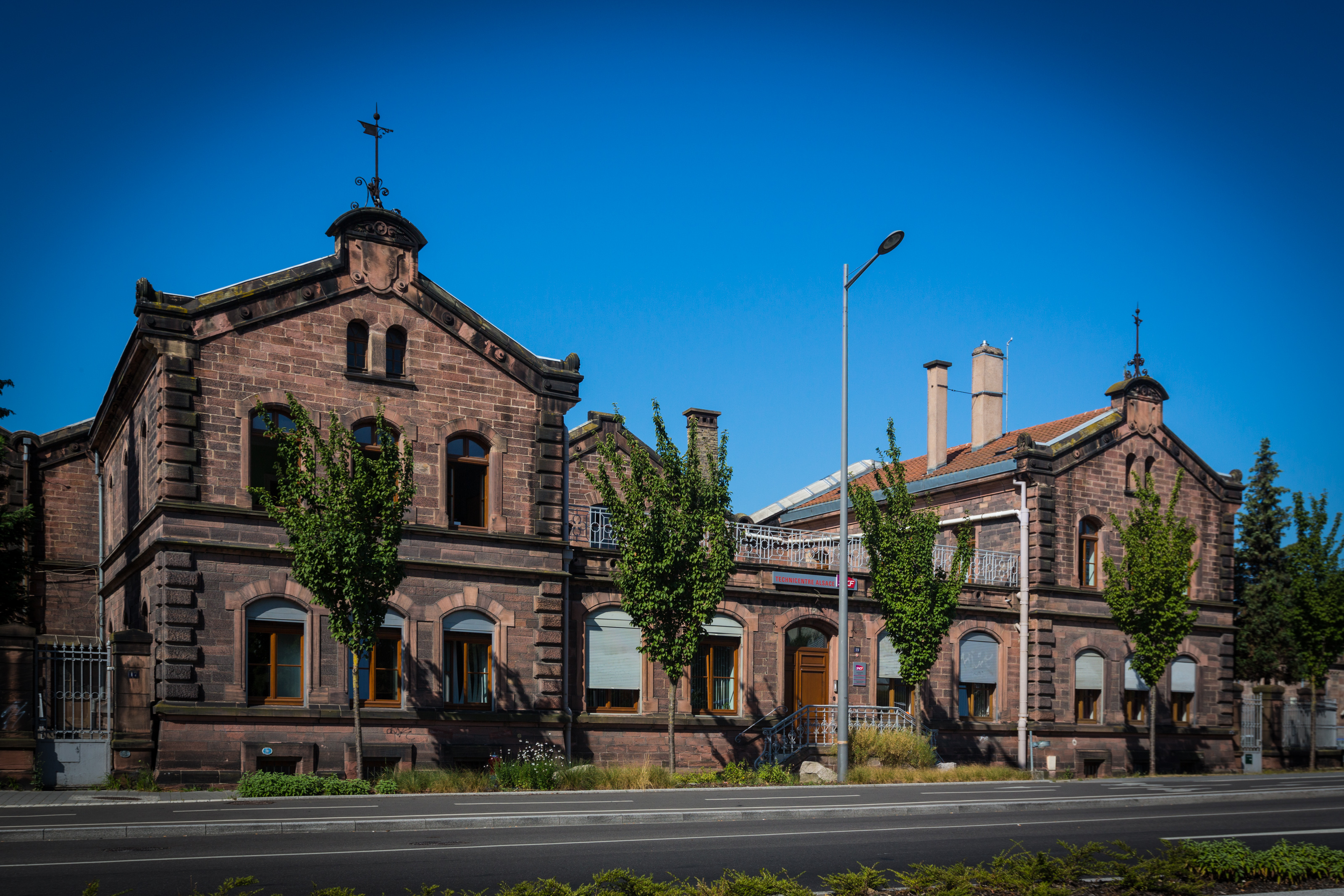 Strasbourg 19 rue Georges Woodli Technicentre Alsace SNCF.jpg